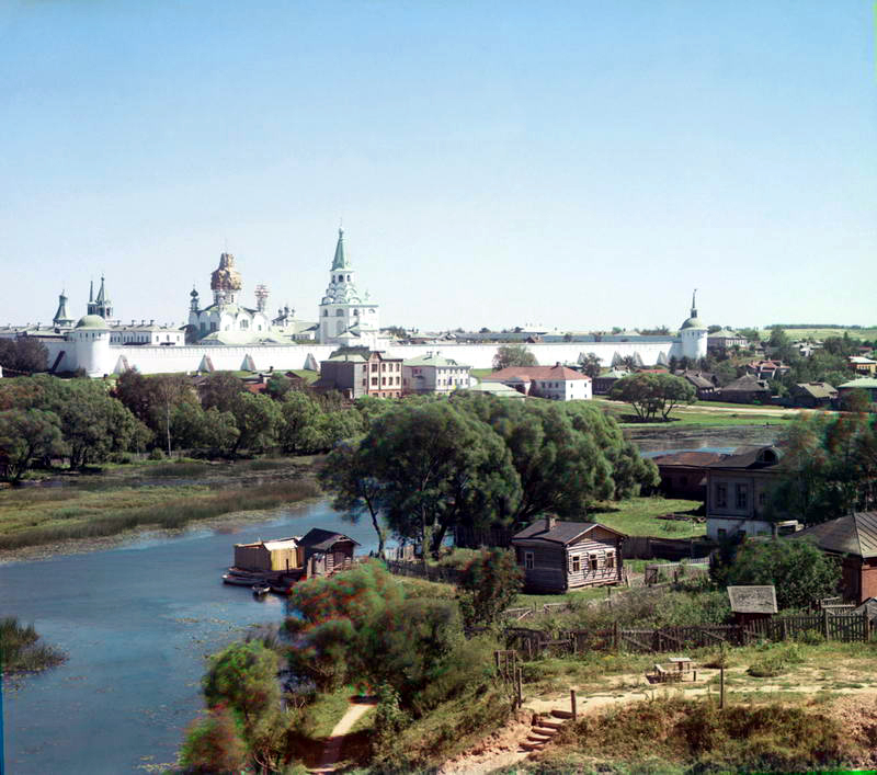 Александровский кремль